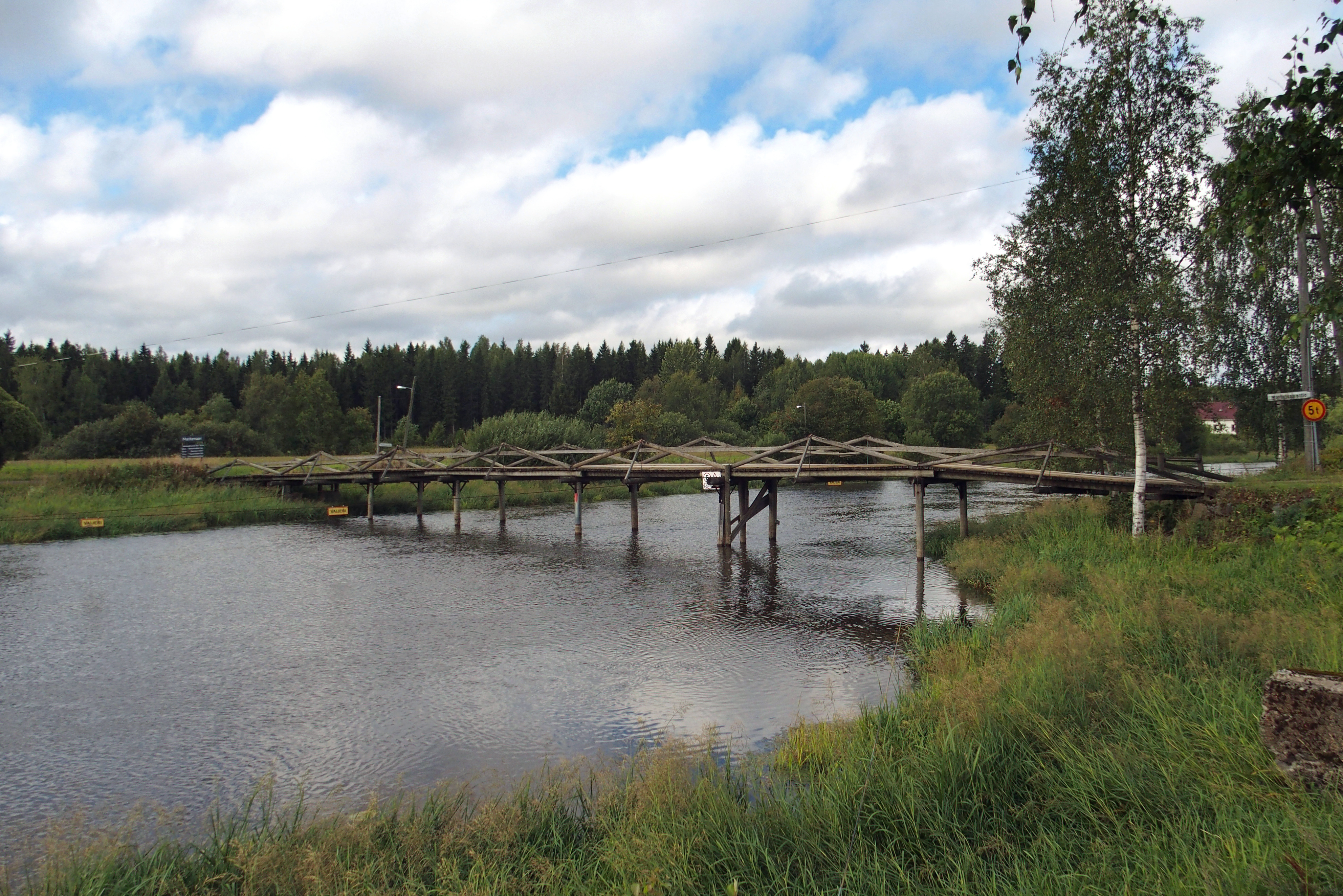 Kyttälän saha